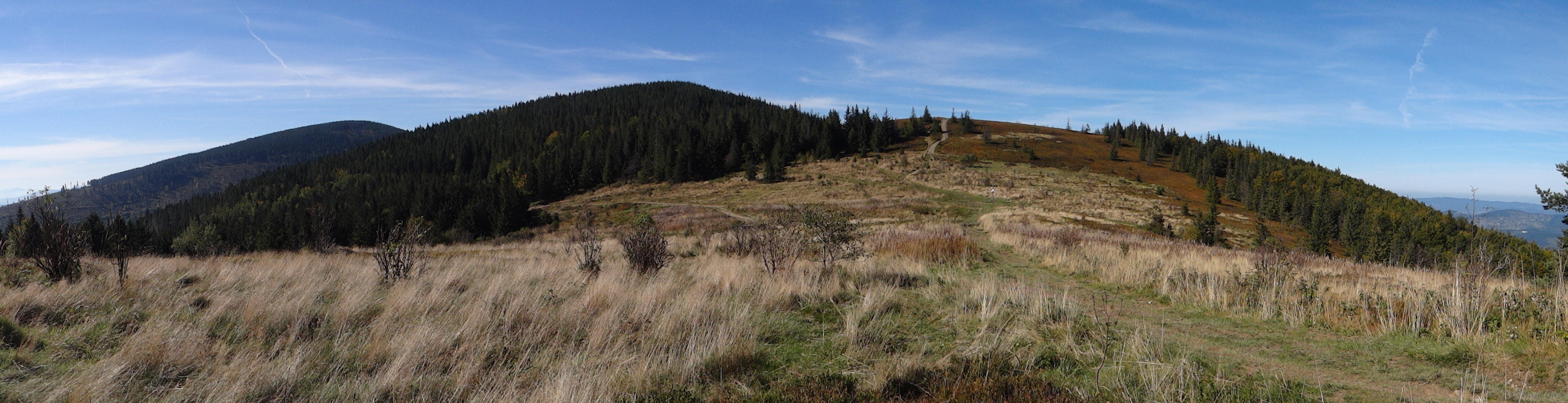 Hala Kucałowa, panorama widokowa na zachód. Od lewej: Polica, Złota Grapa i Jasna Góra